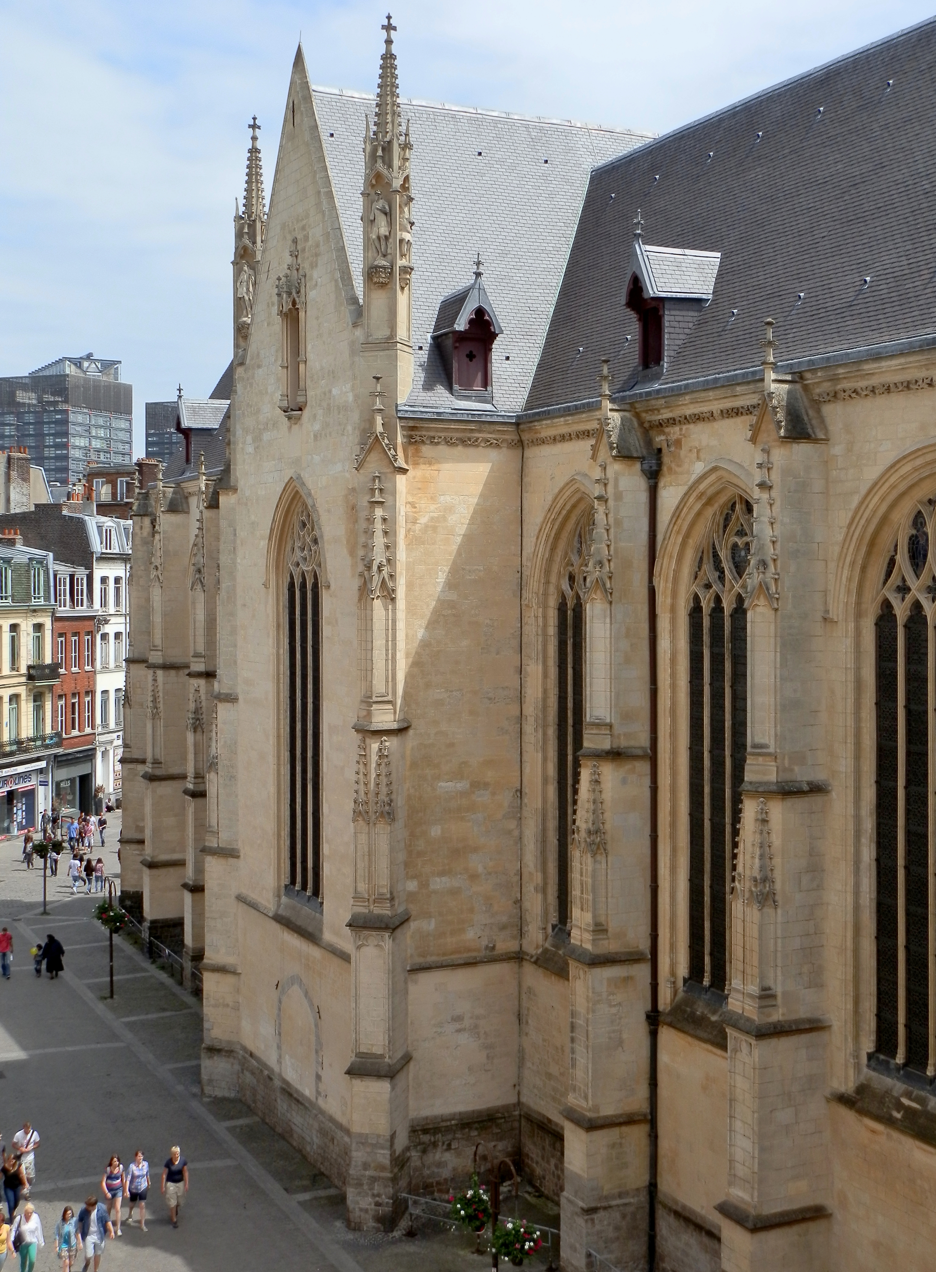 Église Saint-Maurice (Classé, 1840) .